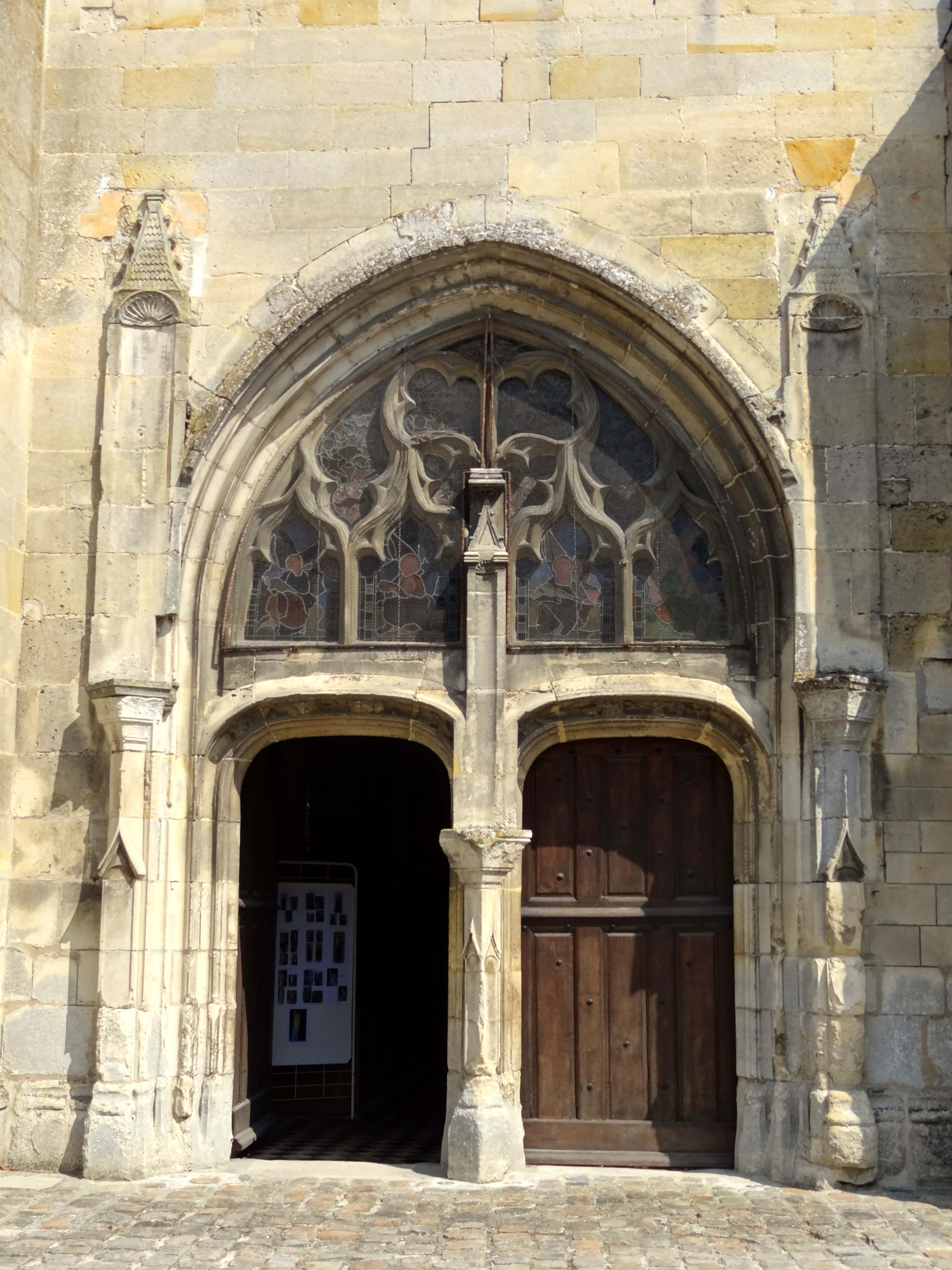 Église Saint-Jacques-Saint-Gilles de Fleurines - voir titre.